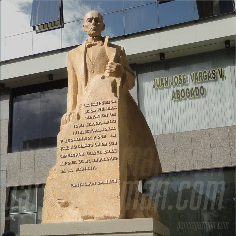 Padre de los abogados